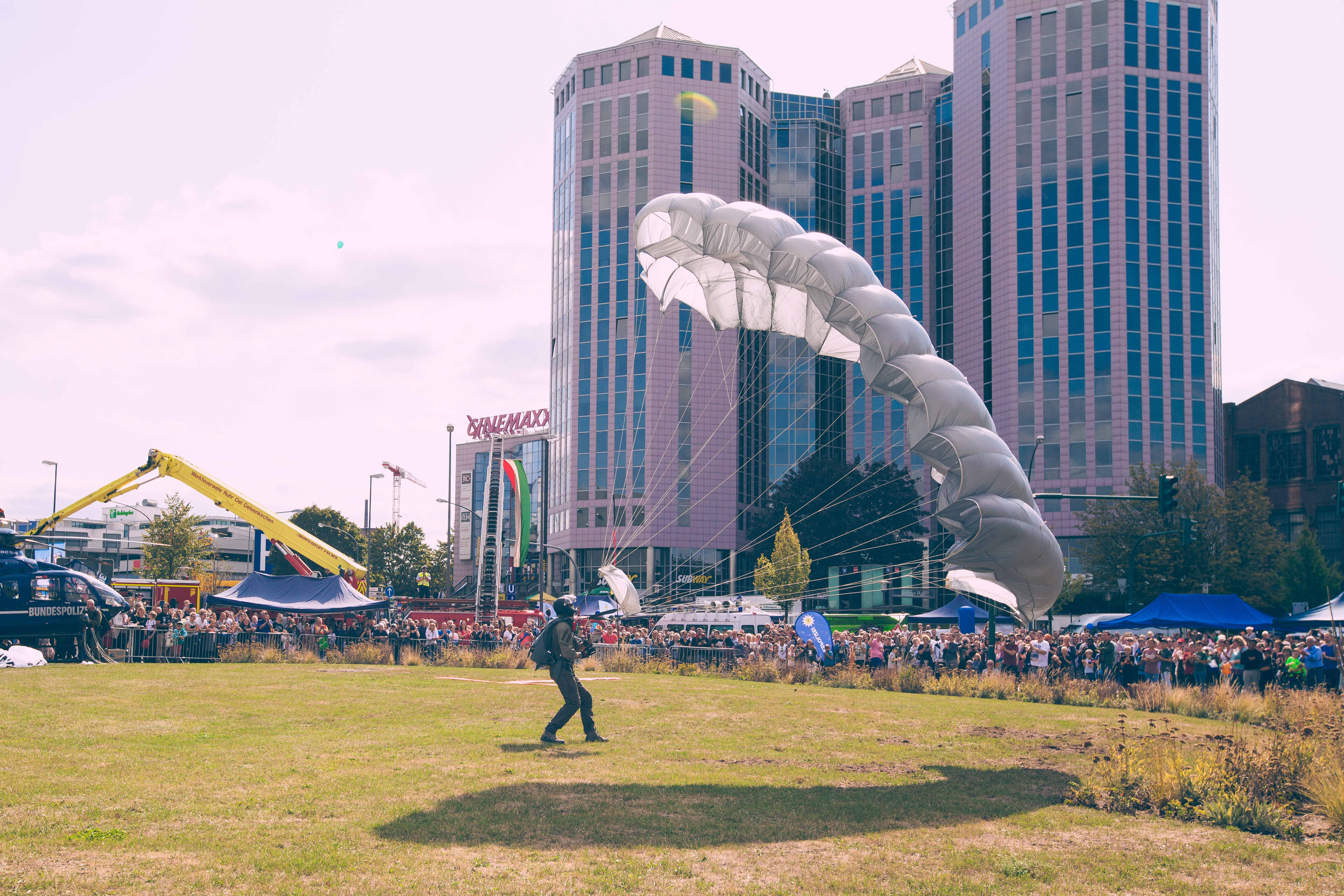 Fallschirmspringer of german federal police "Bundespolizei" Special Unit GSG9 at NRW-Tag (2018), Berliner Platz, Essen (DEU) /// leokreissig.de for Wikimedia Commons